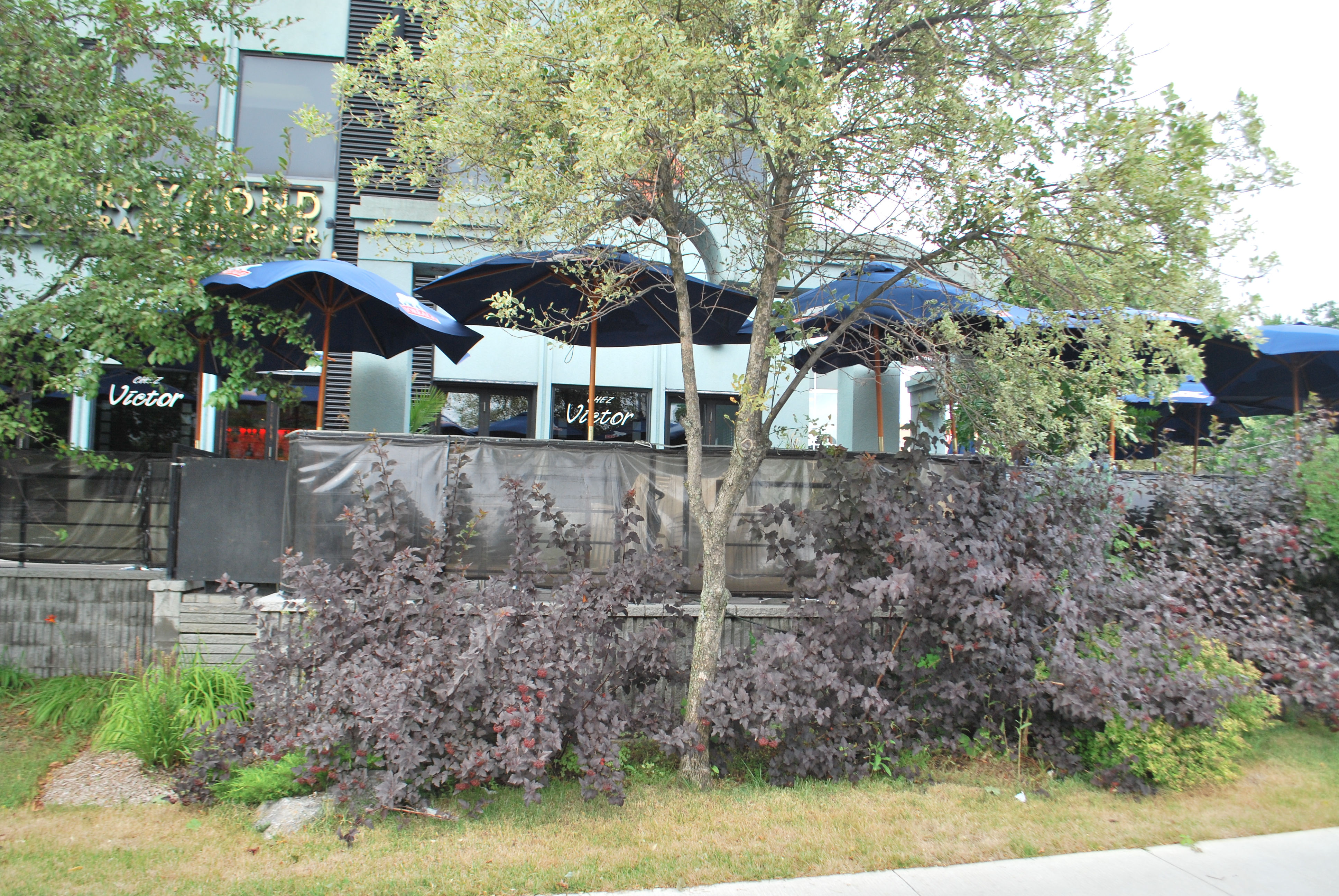 Succursale du restaurant Chez Victor située au coin du Chemin Ste-Foy et de l'Avenue du Chanoine-Scott.